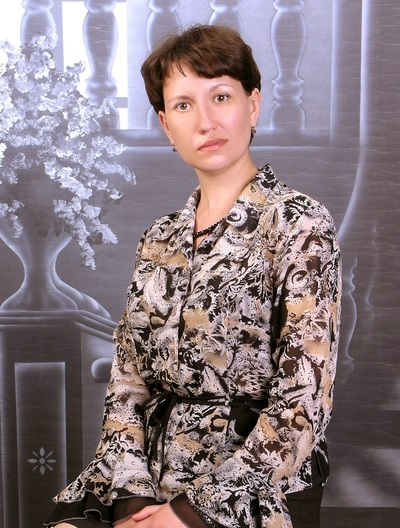 Людмила Дубковецкая, фото обложки сборника авторских стихов и рассказов "Полярная звезда"